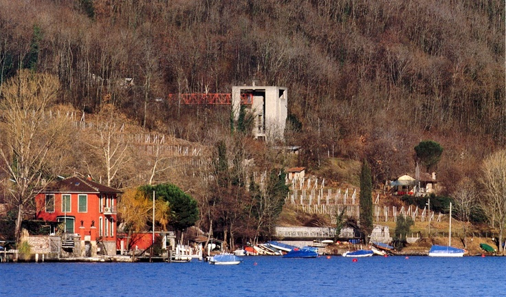 Φωτογραφία της Κατοικίας Μπιάντσι όπως φαίνεται από χώριο δίπλα στην λίμνη Lugano